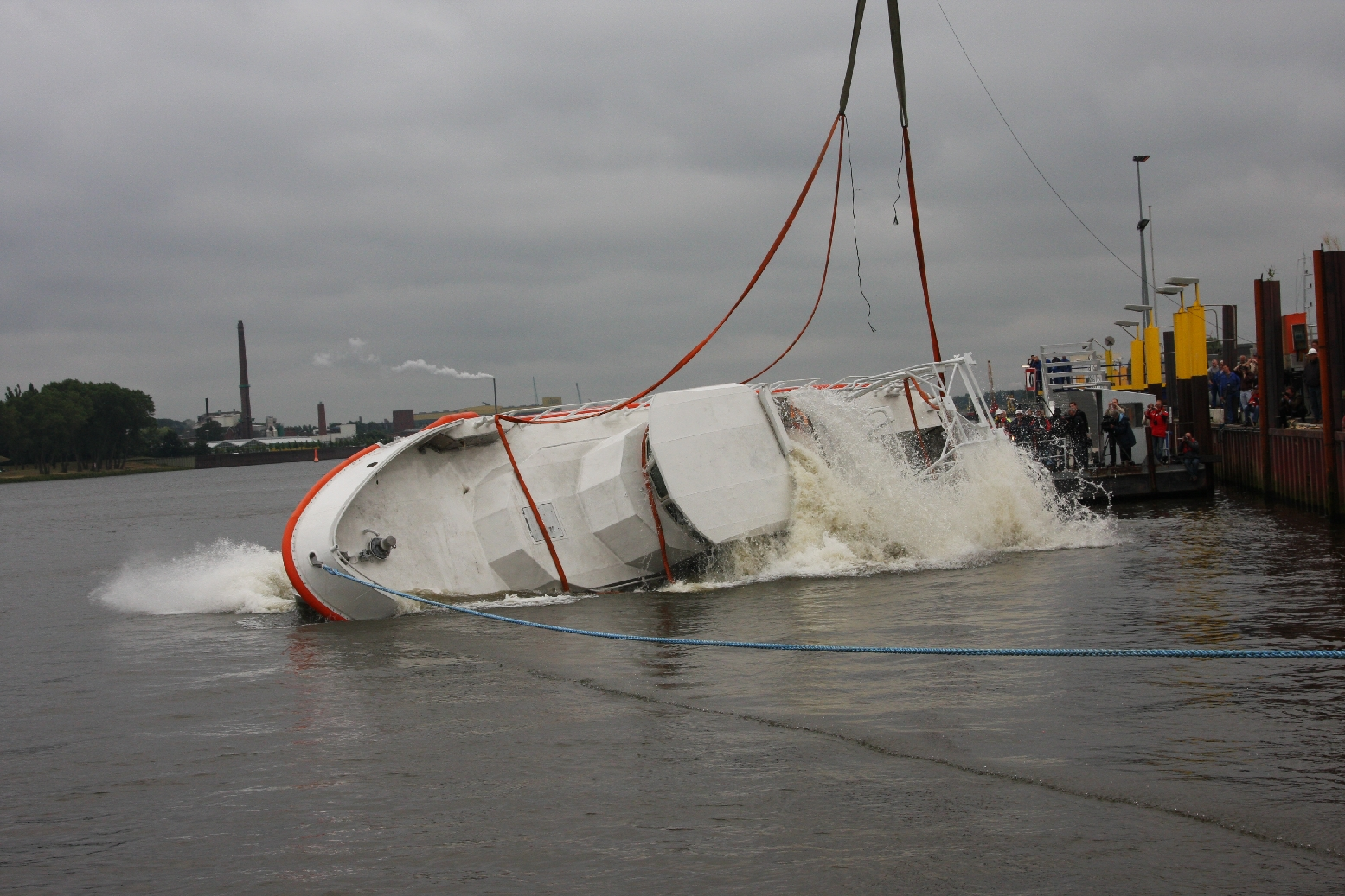 SK Eiswette (II) beim Kentertest an der Fassmer-Werft in Bremen